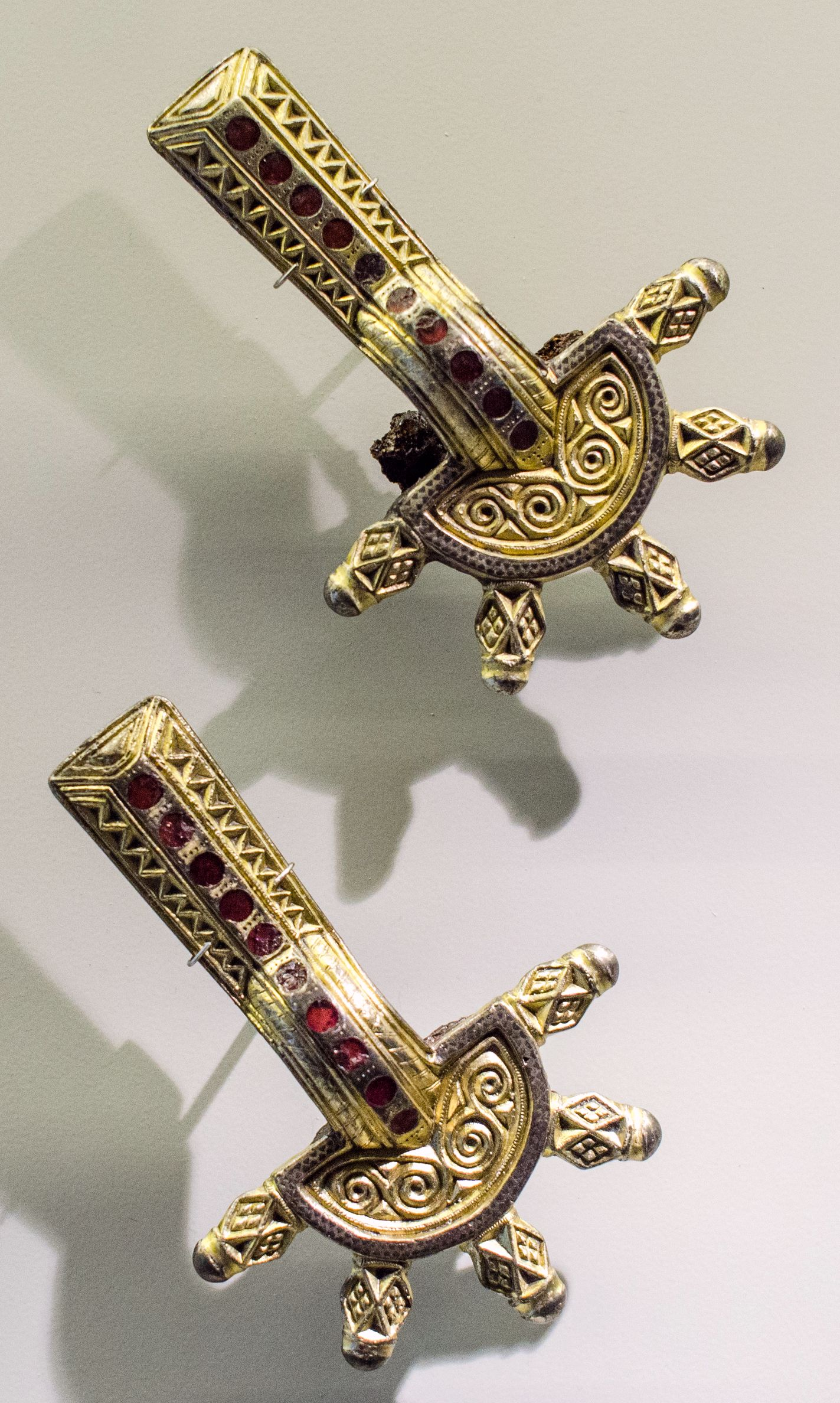 Paire de fibules ansées retrouvées dans les tombes mérovingiennes de la nécropole de Louvres (Val d'Oise).